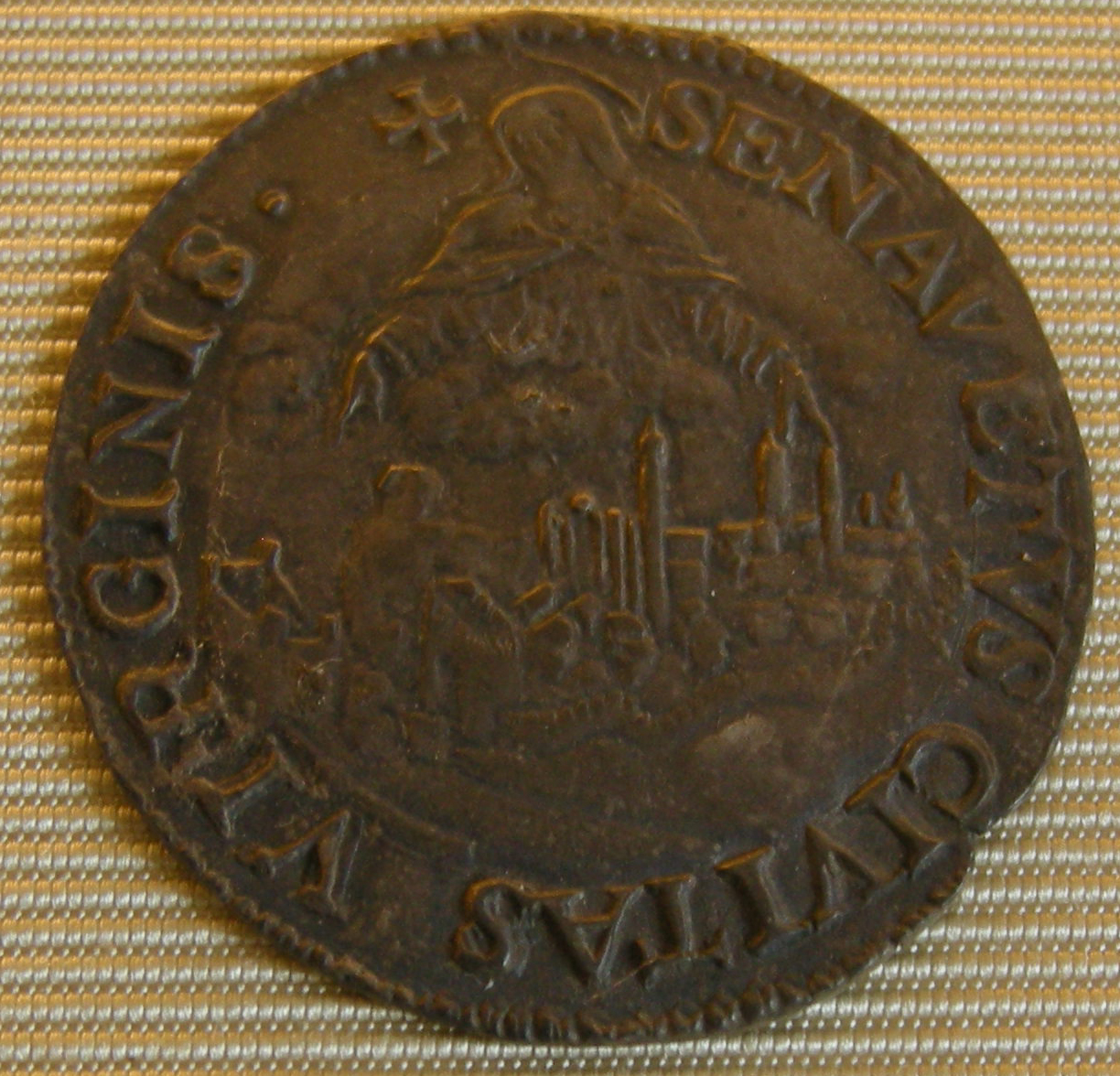 Cosimo I duke of florence and siena coins 1557-68, giulio con vista di siena